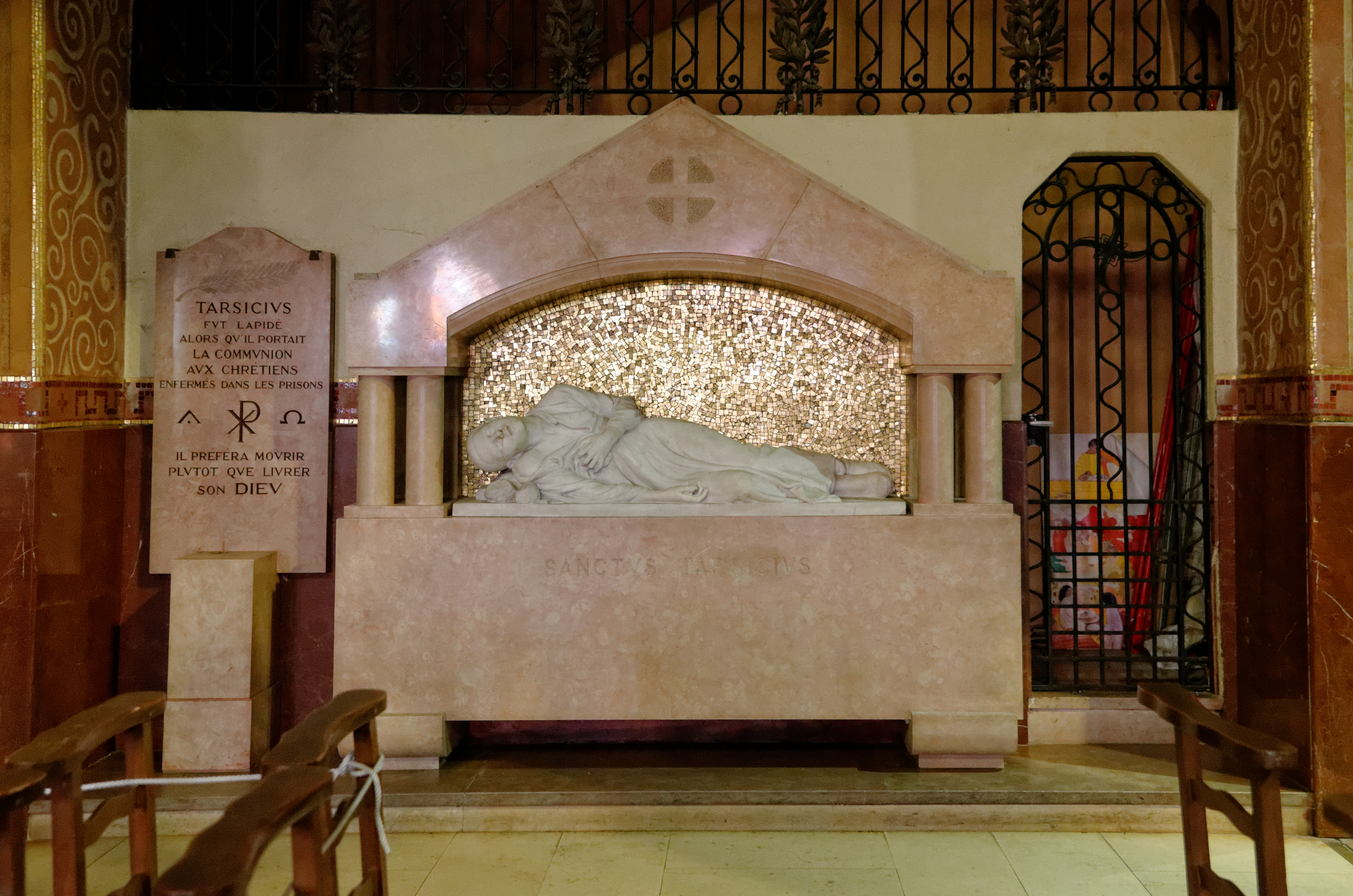 Saint Tarcisius, Église du Sacré-Cœur, (Dijon, Côte d'Or, Bourgogne, France). .